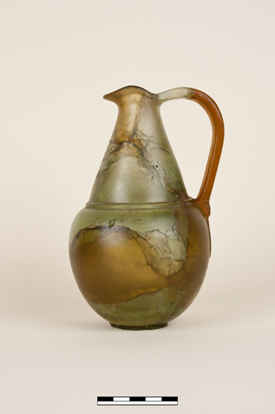 Tesoro de Aliseda (Jarrito tallado) (Periodo Orientalizante). Número de inventario: 28583.